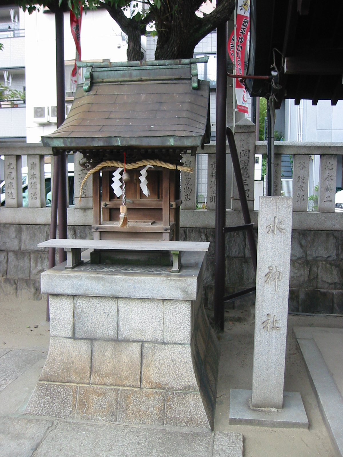 神戸蛭子神社